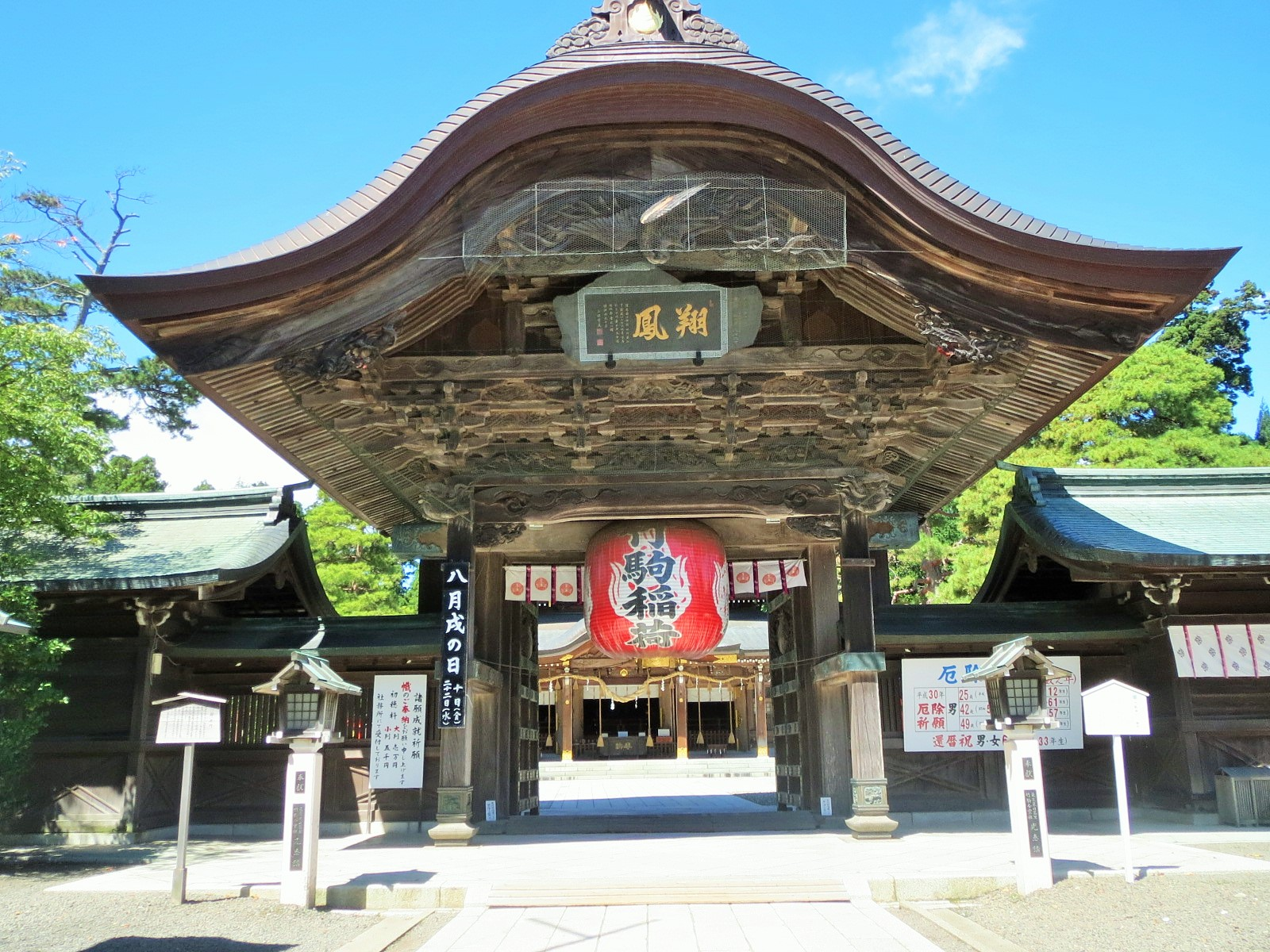 竹駒神社唐門 Canon IXY 3